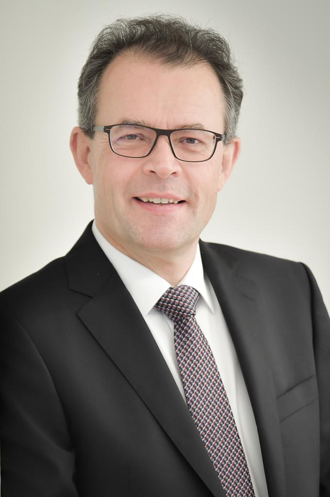 Georg Wacker, Geschäftsführer Toto-Lotto GmbH Baden-Württemberg